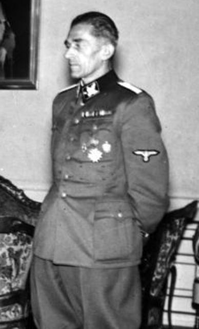 K. H. Frank